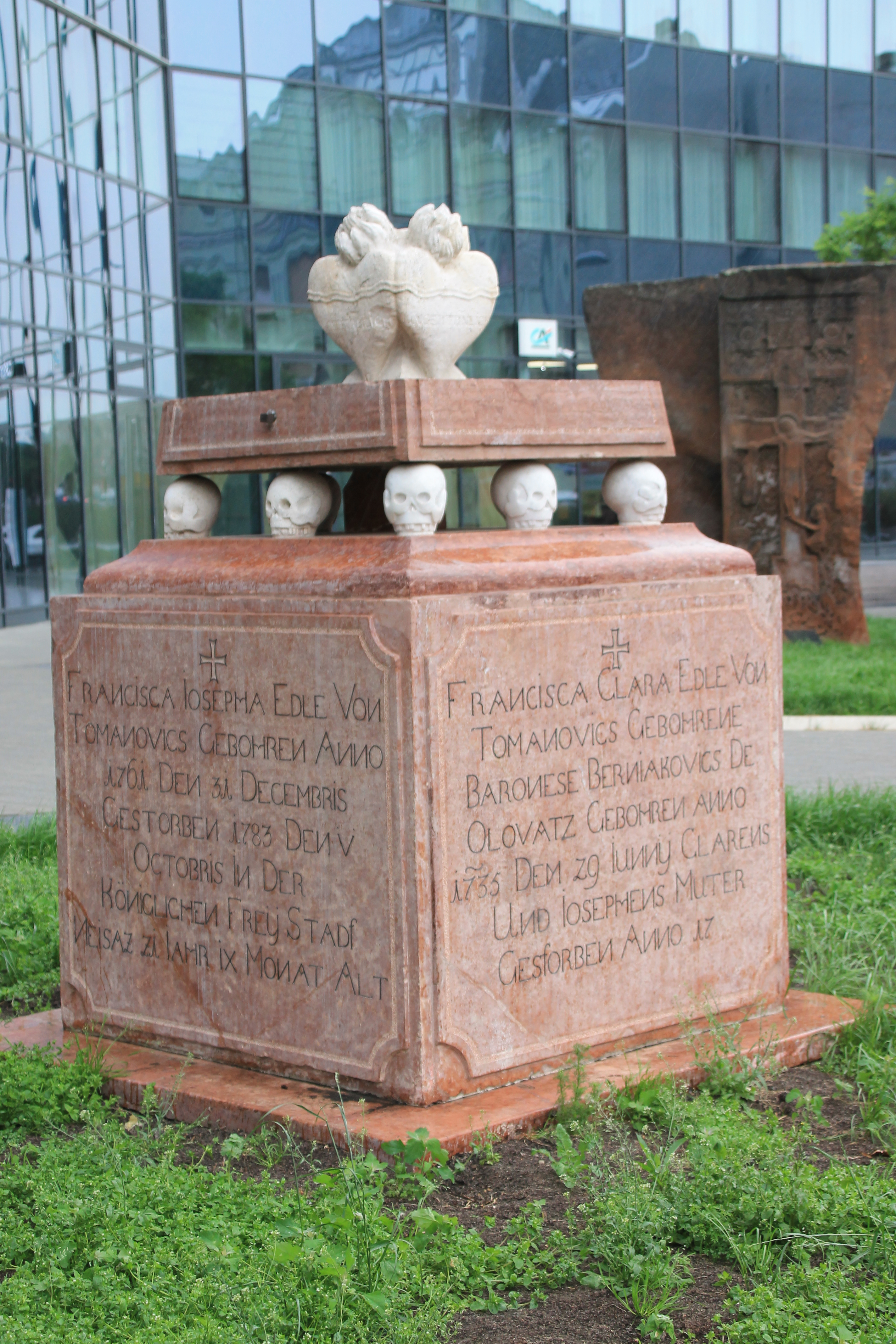 Nadgrobni spomenik porodice Čanadi